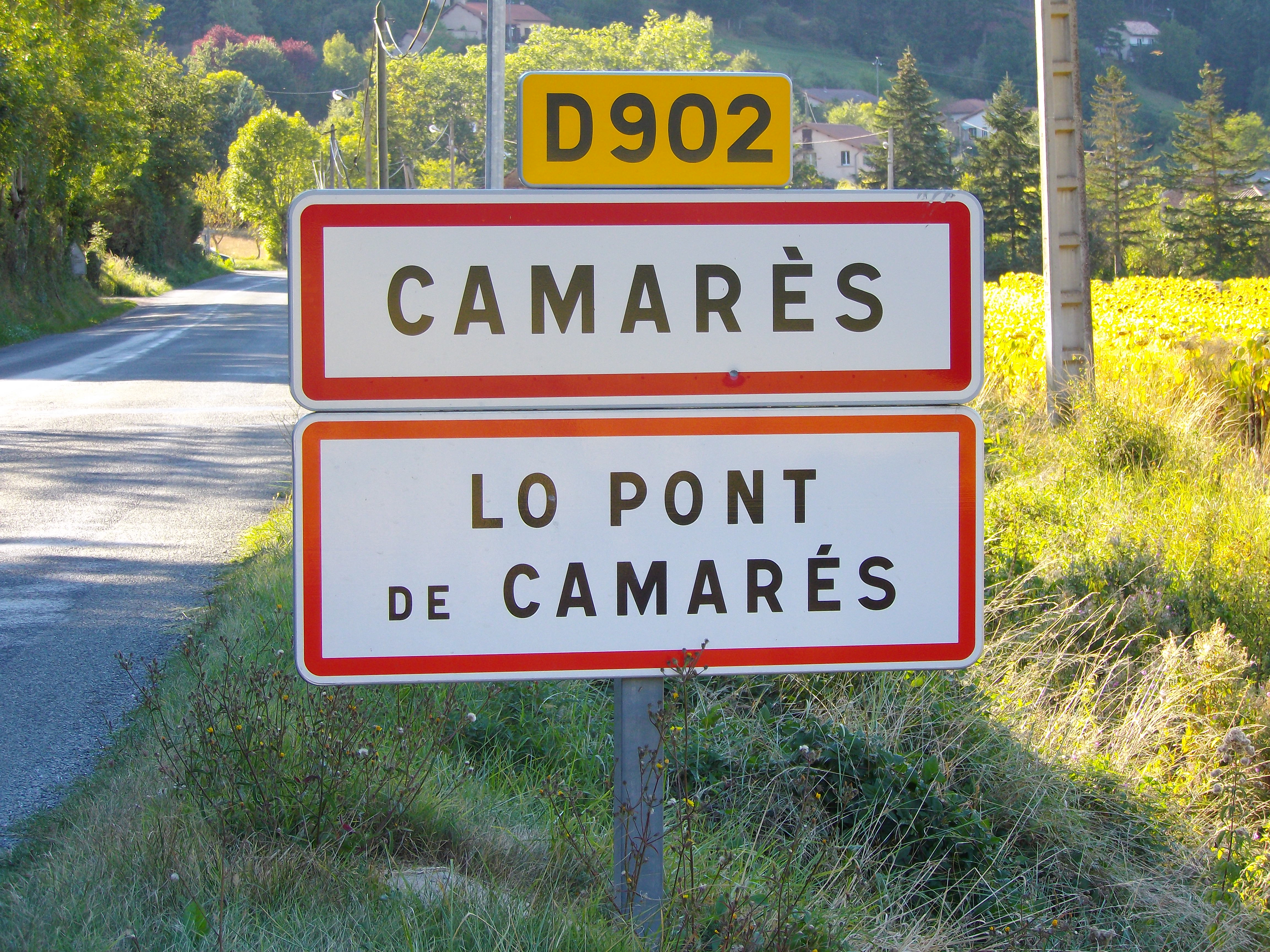 Panneau bilingue français-occitan à l'entrée de Camarès (Aveyron, France)